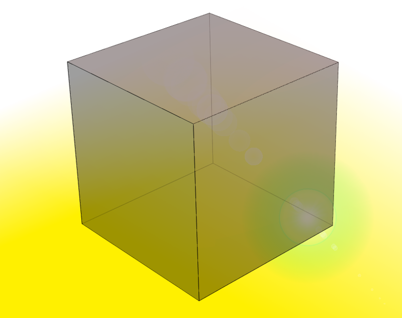 Regulāru daudzstūru daudzskaldņa ilustrācija